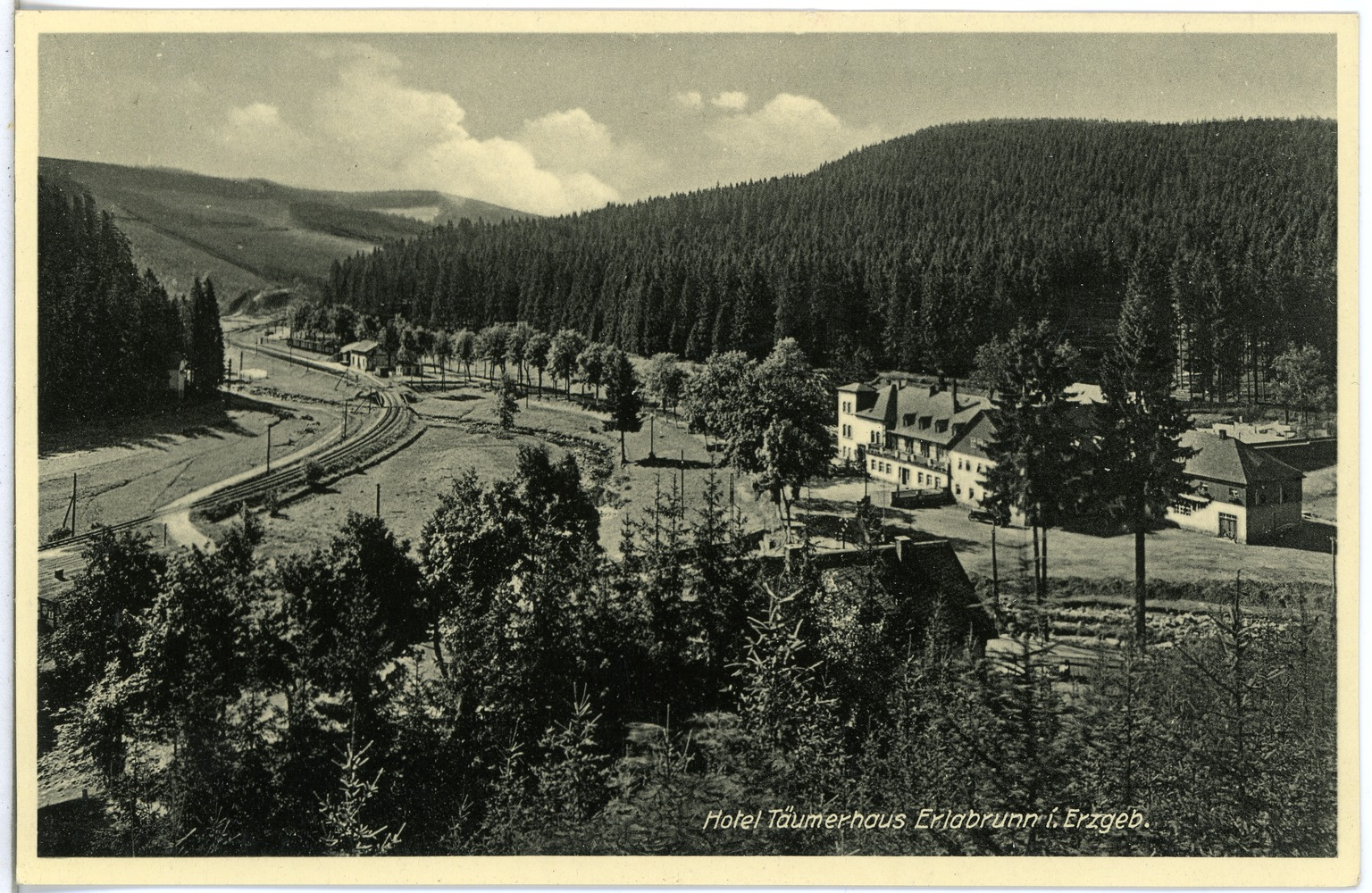 Erlabrunn; Hotel Täumerhaus This postcard is from publisher Brück & Sohn in Meißen ( postcard has a unique number 26275 and is available in a higher resolution at the publisher. This images was uploaded in a cooperation project between Wikipedians and the publisher.